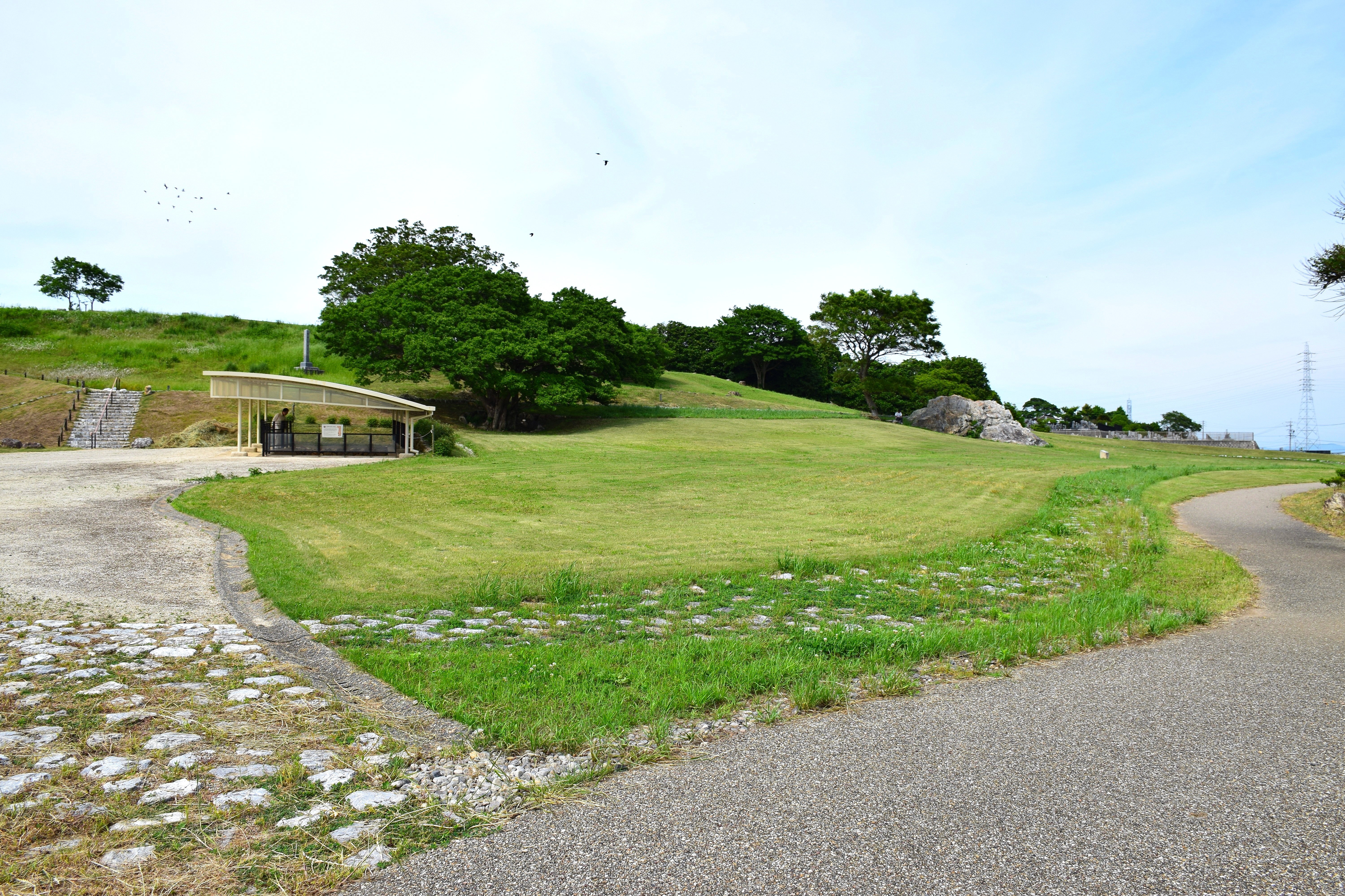 吉胡貝塚史跡公園